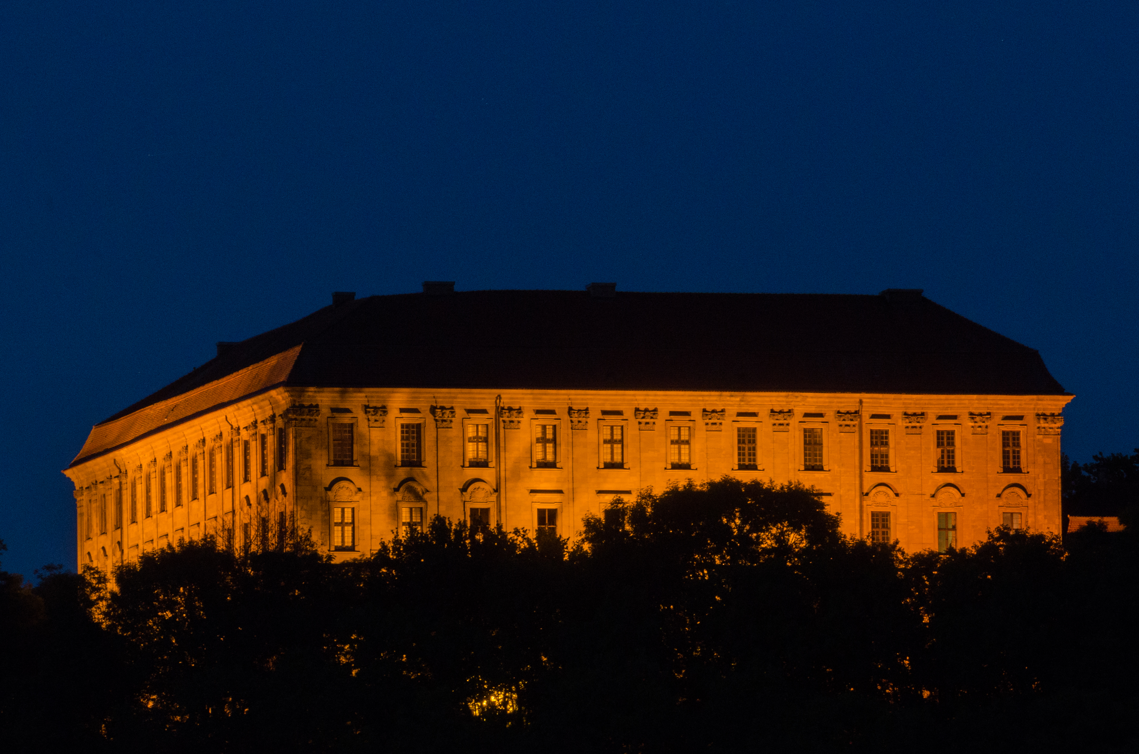 Schloss Schillingsfürst zur blauen Stunde